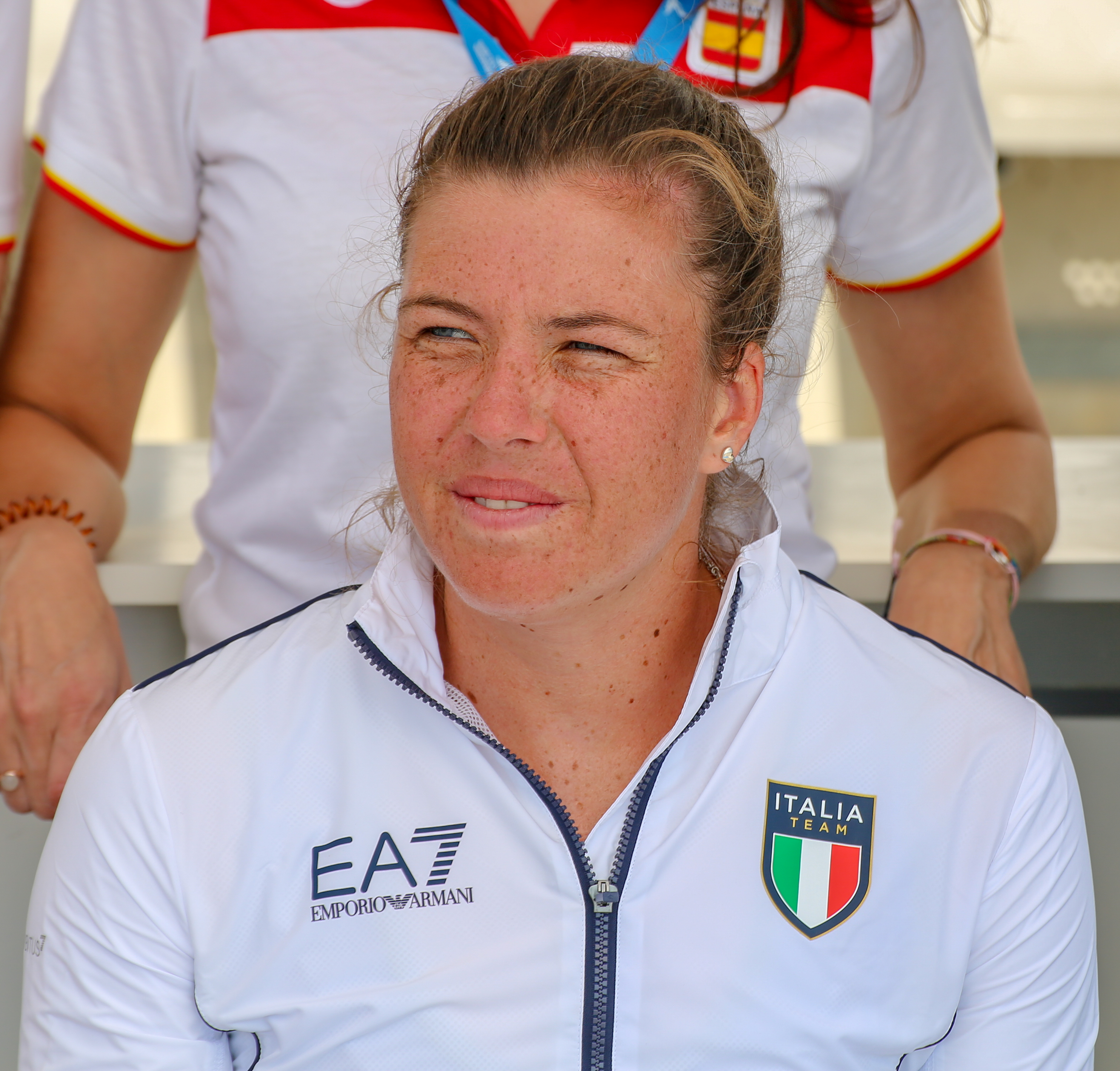 Kiri Tontodonati, plata en los Juegos del Mediterráneo 2018